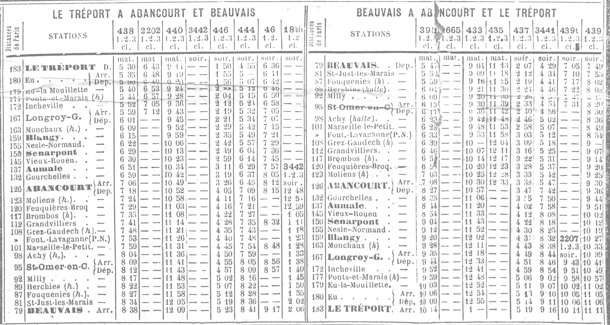 Extrait de l'affiche éditée en supplément du Le Courrier de la Somme : Horaires des trains du service d'hiver (novembre 1890) : Ligne Le Tréport - Abancourt - Beauvais